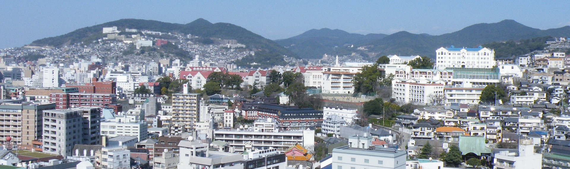 長崎市東山手地区を南山手のグラバースカイロード山側出入口脇から遠望。活水女子大学、海星中学校・高校、東山手十二番館などが望める。